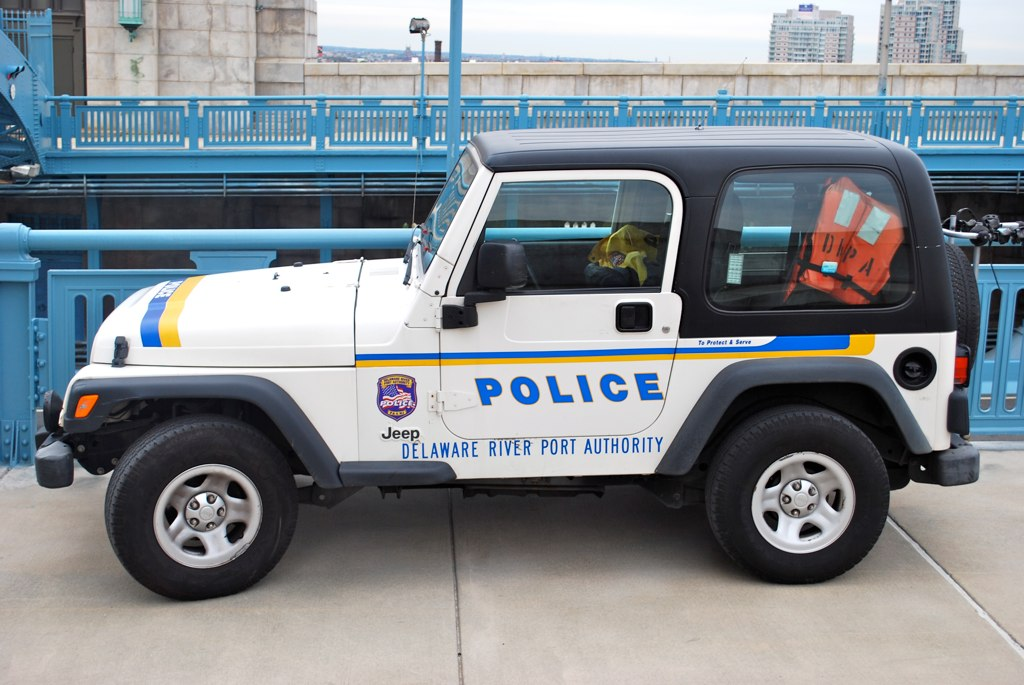 DRPA Police